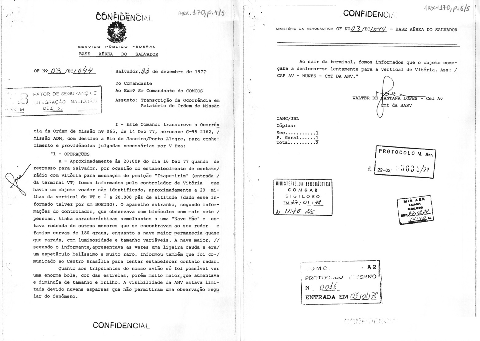 Registro de avistamento de Objeto Voador Não Identificado - OVNI ocorrido em dezembro de 1977, na Bahia. Fundo Objeto Voador Não Identificado (OVNI)